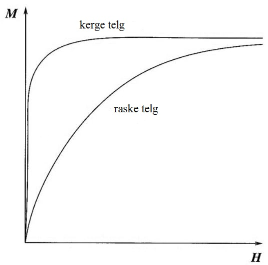 Ferromagneetilise materjali magneetumuskõverad, kui väline magnetväli on orienteeritud mööda kerget ja rasket telge.